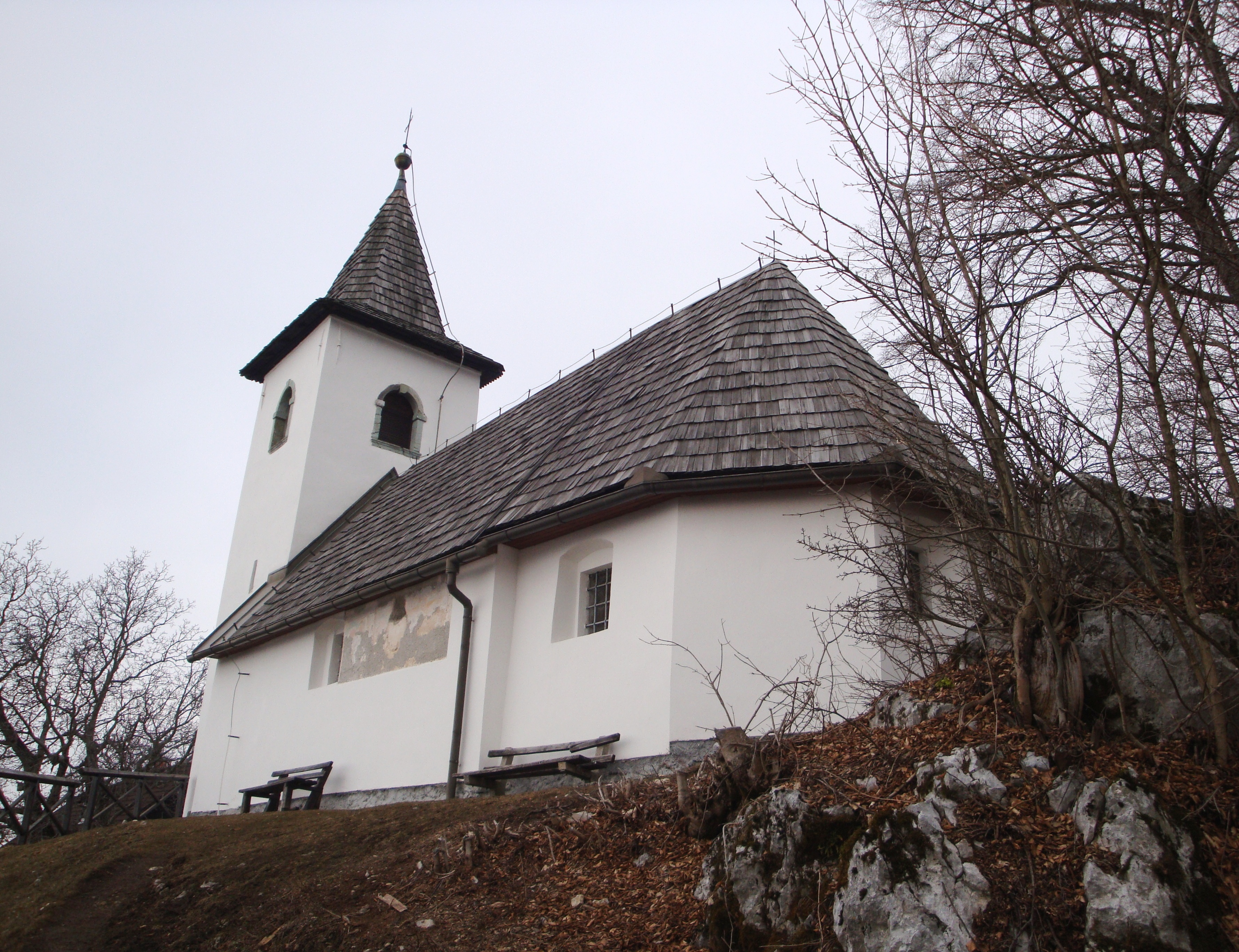 Cerkev Sv. Jakoba nad Preddvorom.